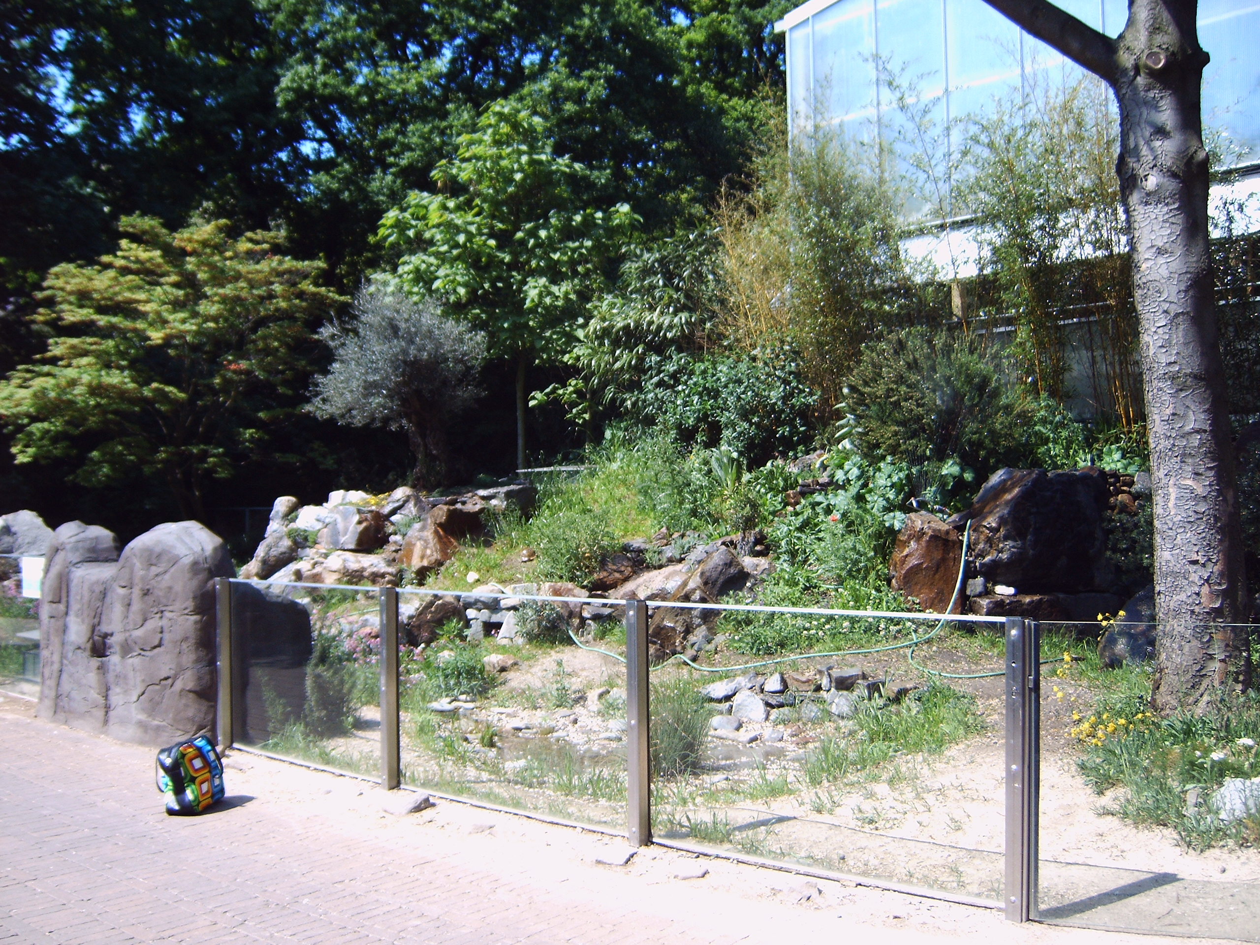 Schildkrötenanlage im Duisburger Zoo, Kim Dasbeck